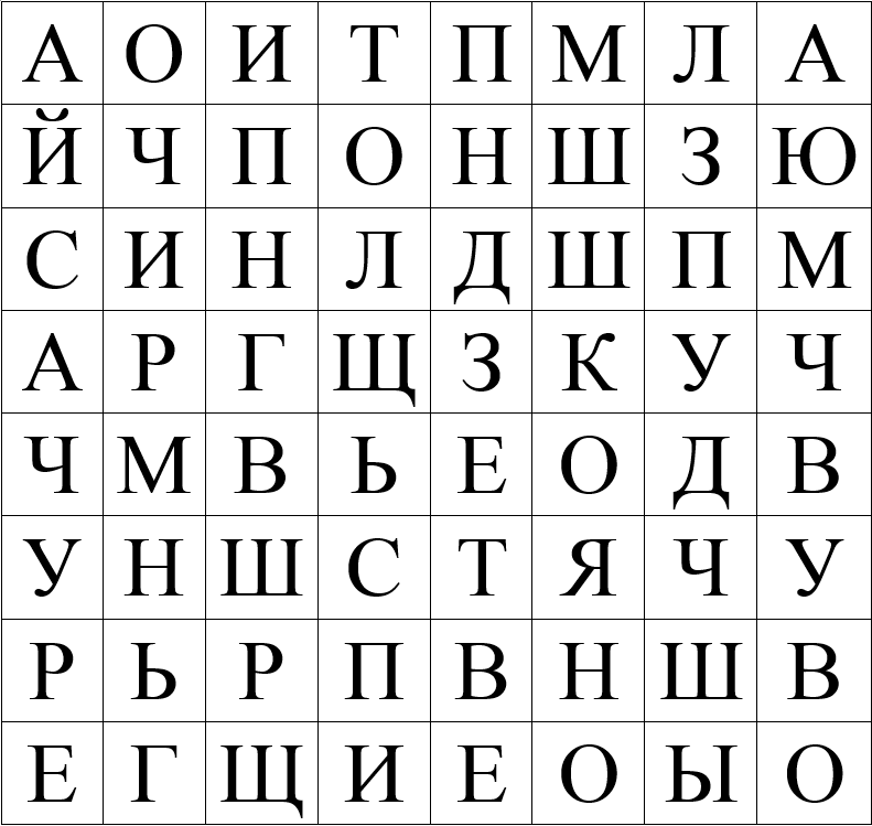 Квадратная решетка Кардано